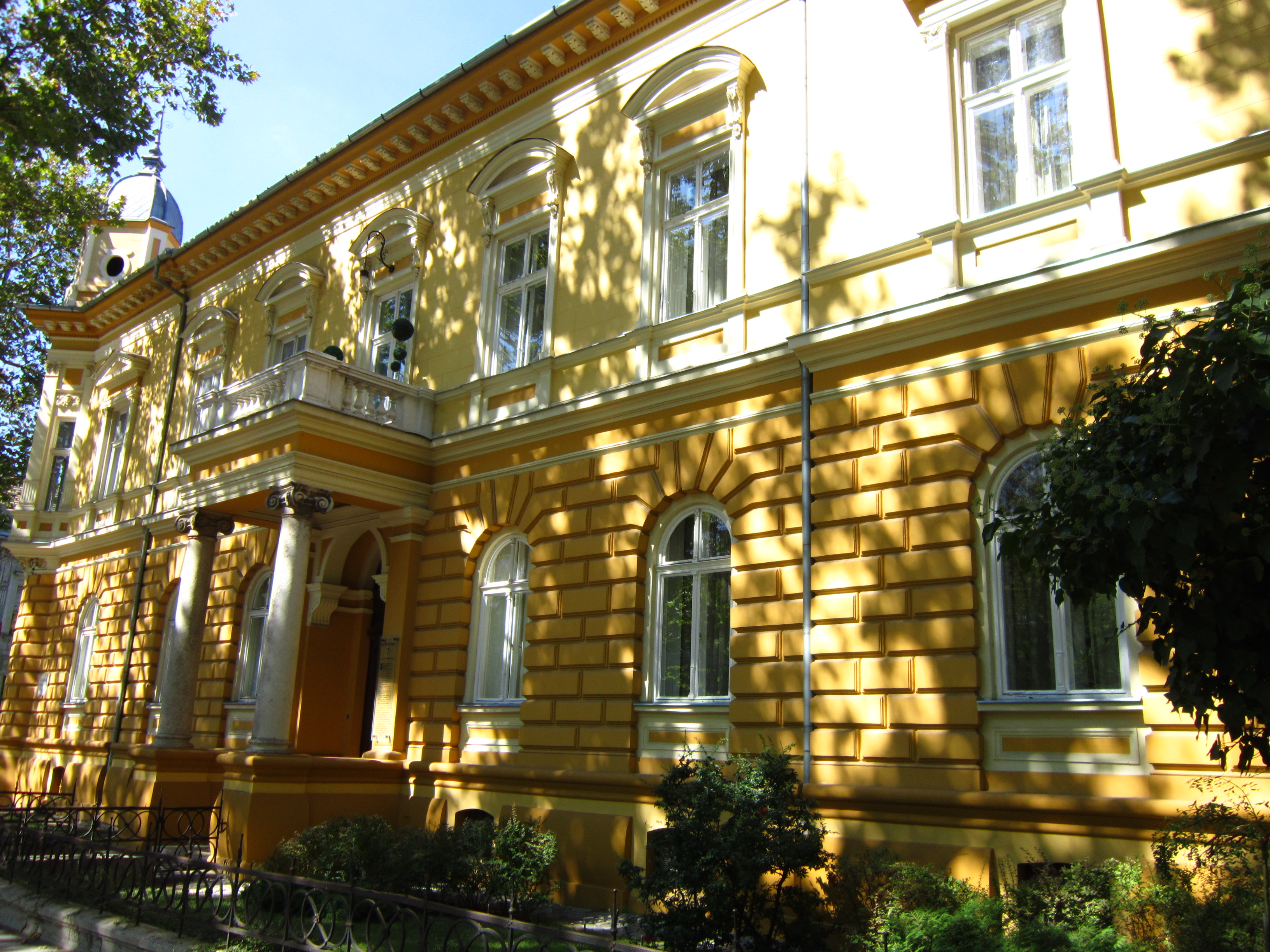 Зграда у парку Рајхл Ференца бр. 7 , Суботица